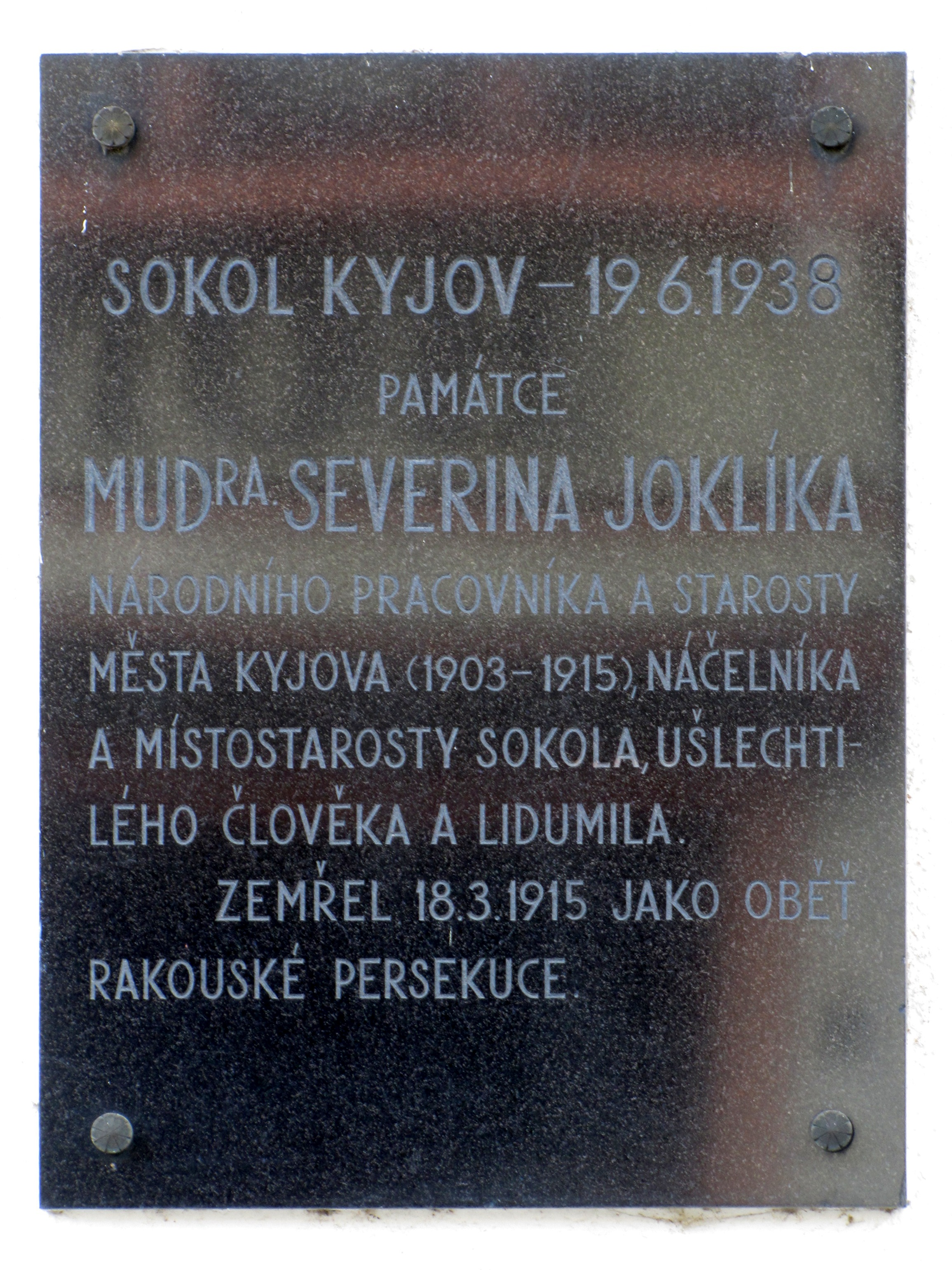 Pamětní deska Severina Joklíka na budově sokolovny v Komenského ulici v Kyjově